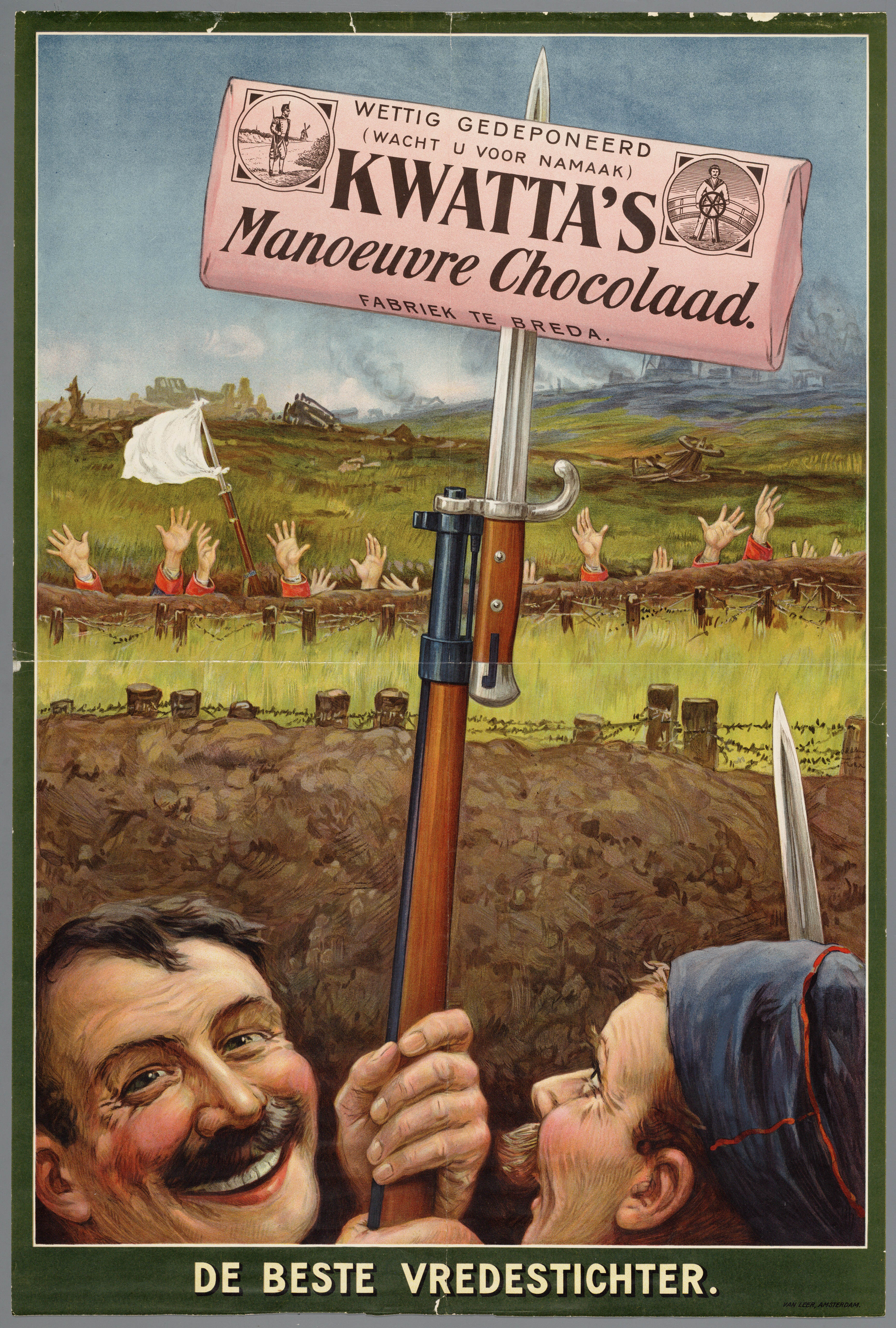 Affiche: Kwatta's Manoeuvre chocolaad. De beste vredestichter.